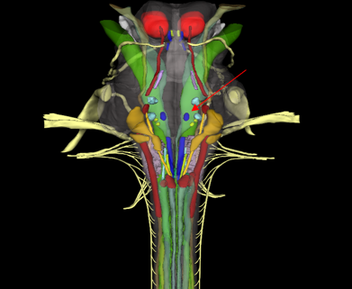 Irudi honetan entzefalo enborra eta bertako zenbait nukleo ikusten dira. Gezi gorriak abducens-nerbioaren nukleoa seinalatzen du. Urdinez dauden nukleoak nukleo eragile somatikoak dira.